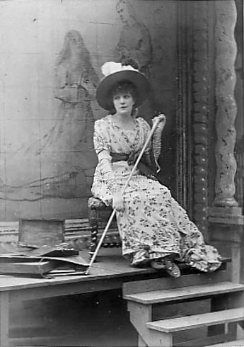 Sarah Bernhardt in La Tosca